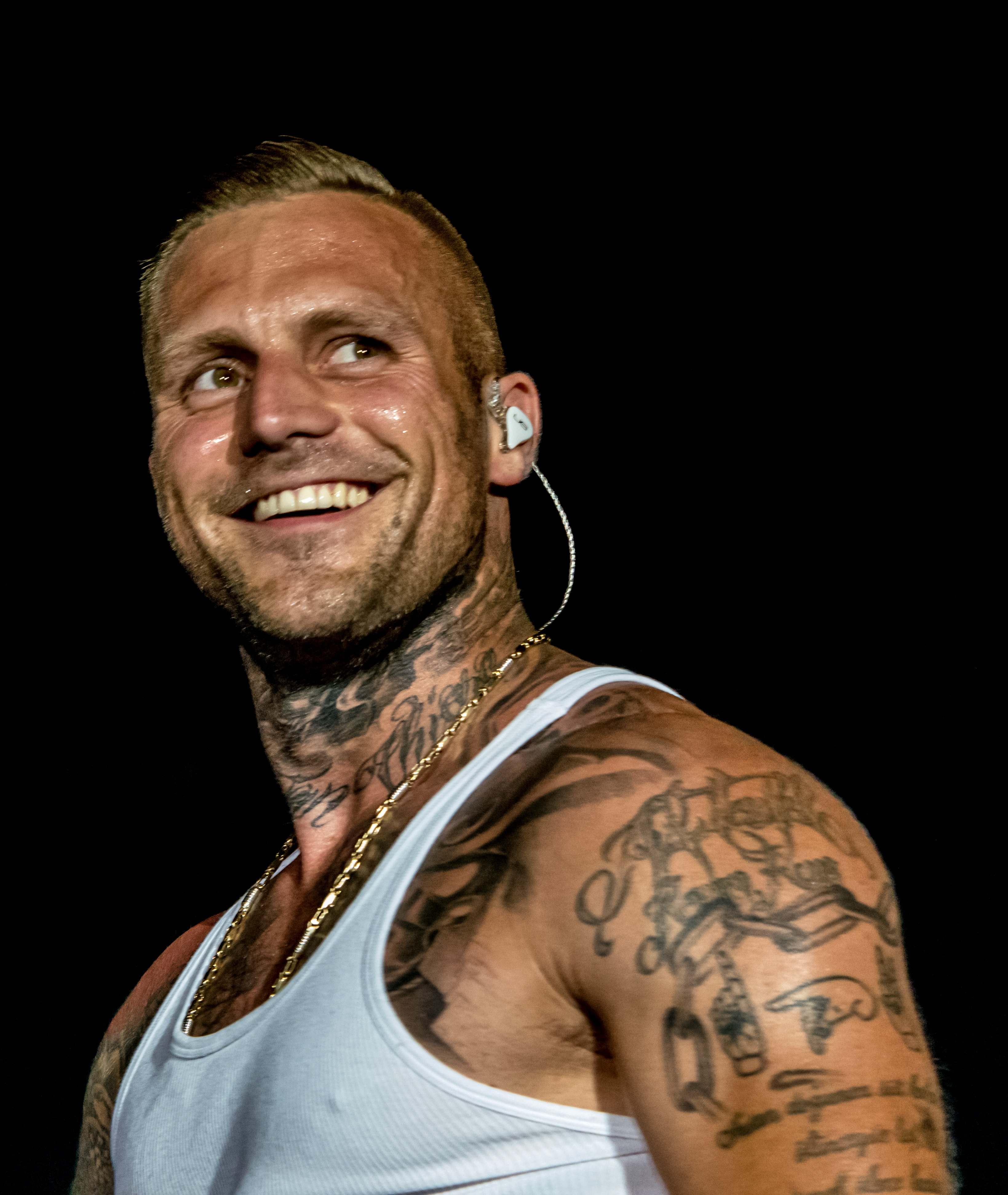 Bilder vom Zelt Musik Festival 2018 in Freiburg im Breisgau Kontra K am 27.07.2018 im Zirkuszelt